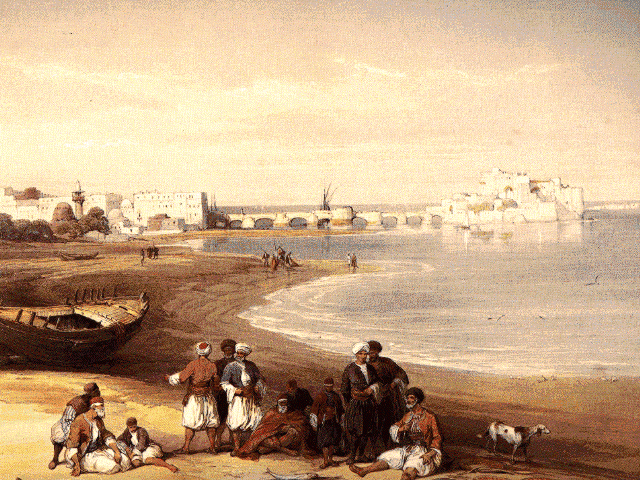 Litografía del siglo XIX que representa el Castillo del mar en Sidón.